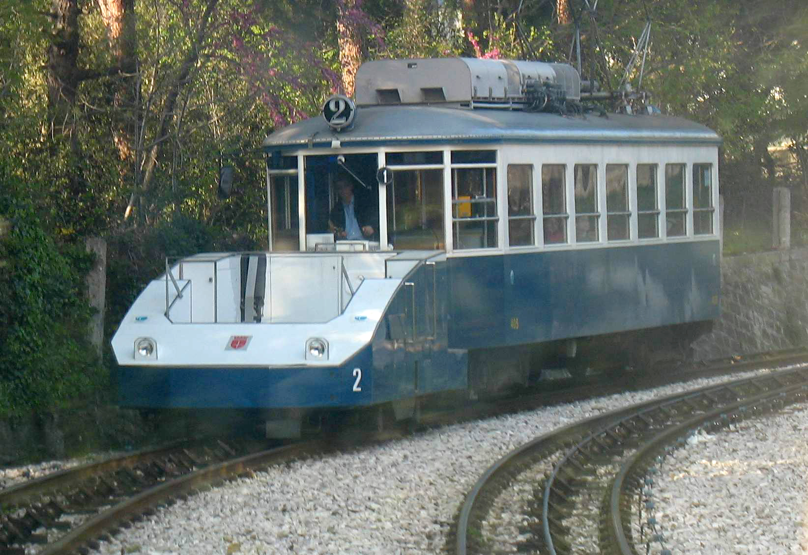 Lo "spintore" n° 2, in esercizio dal 2006, a metà del tratto a funicolare